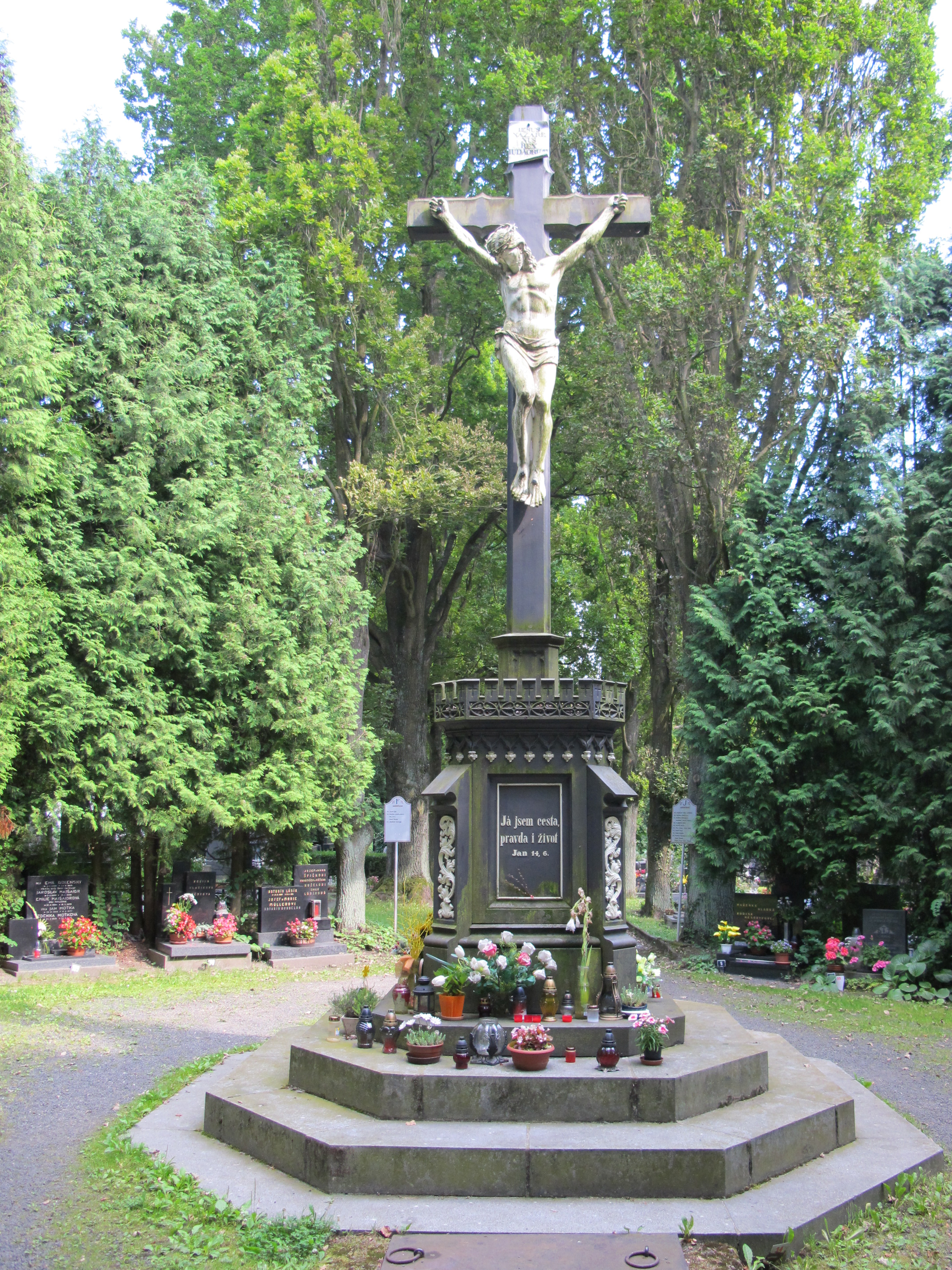 Hřbitov v Turnově